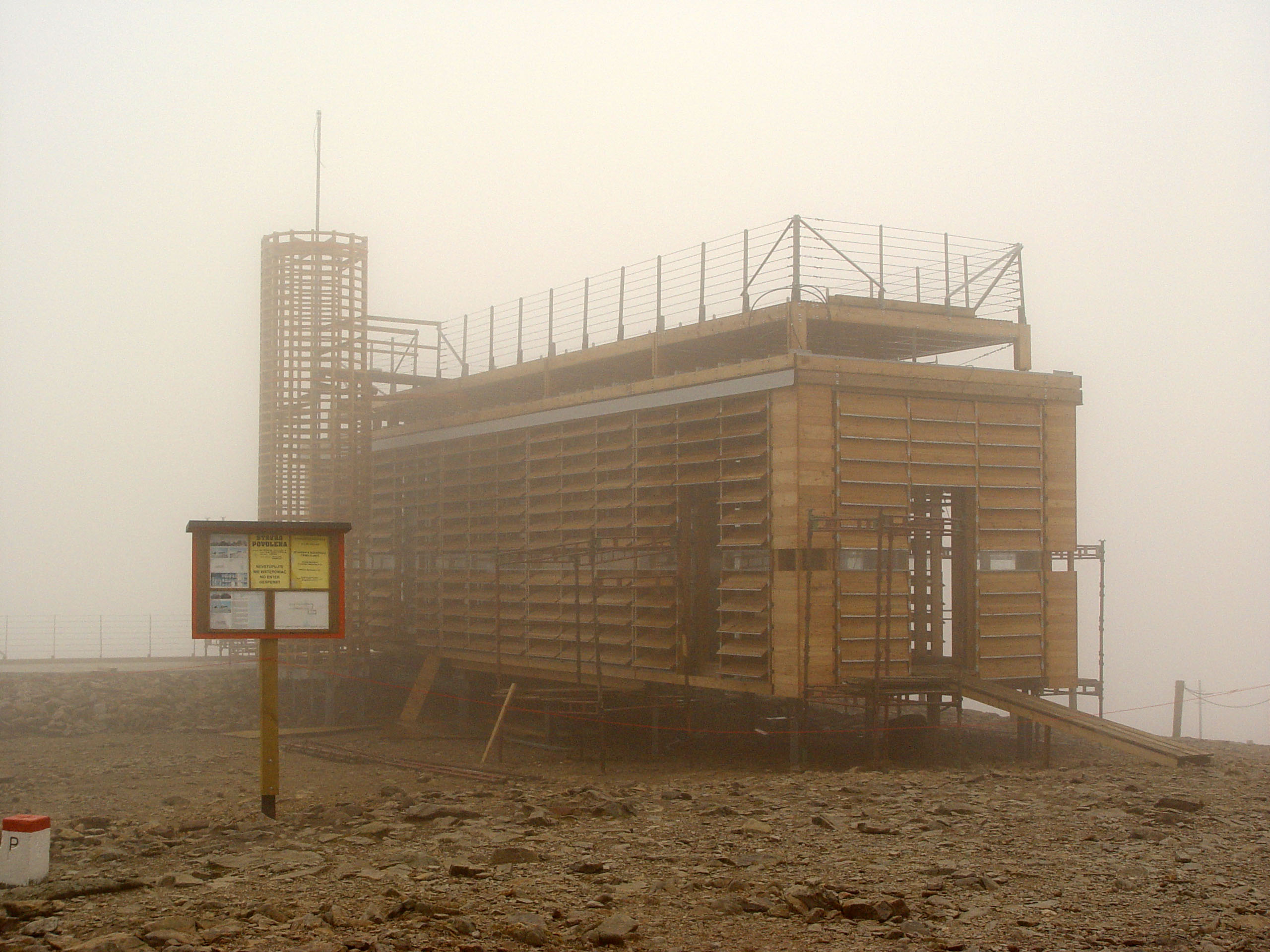 Nová poštovna na Sněžce